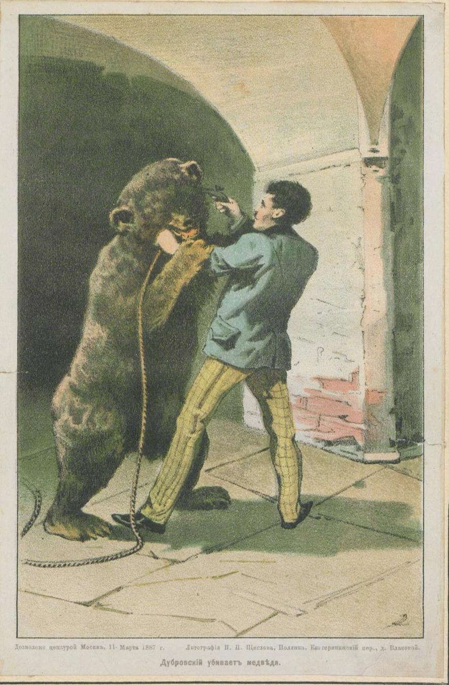 Litografia del 1887 di P. P. Ščeglov in cui è rappresentata la lotta tra Dubrovskij-Deforges e l'orso